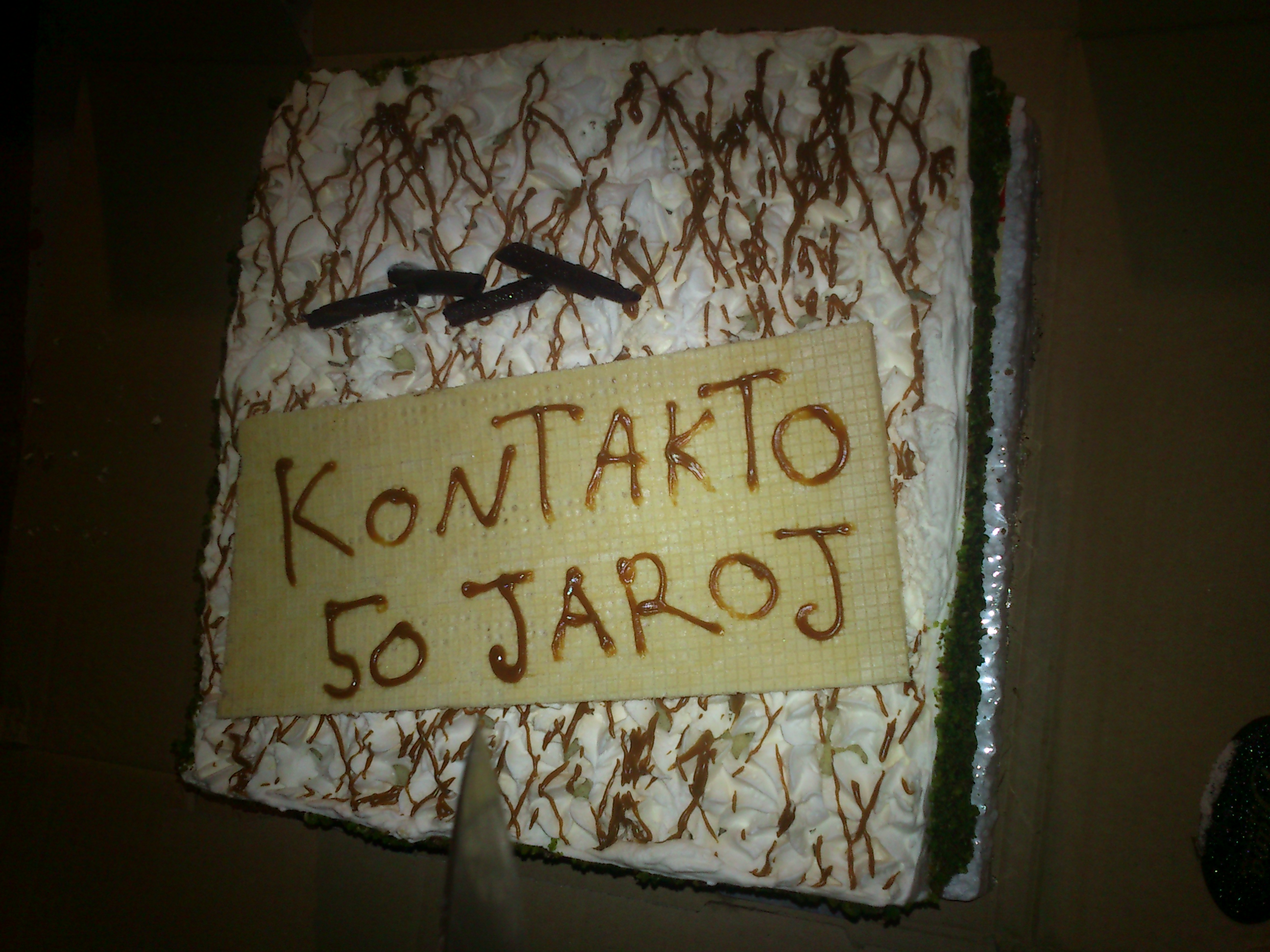 50-jariĝa kuko de Kontakto dum la 69-a IJK en Nazareto, Israelo.